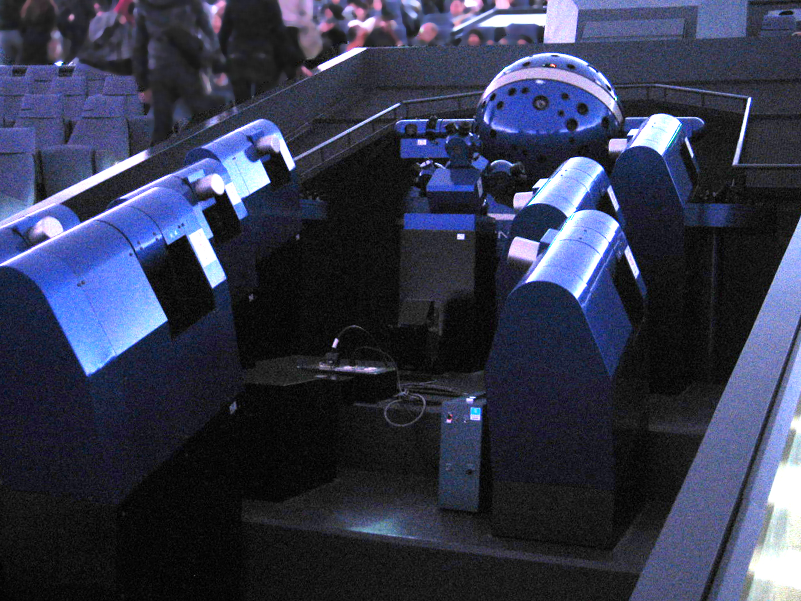 コニカミノルタ プラネタリウム INFINIUM L-OSAKA 大阪市立科学館